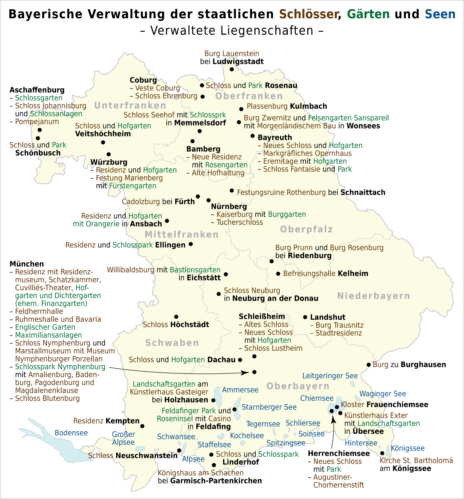 Karte der verwalteten Objekte der Bayerischen Verwaltung der staatlichen Schlösser, Gärten und Seen